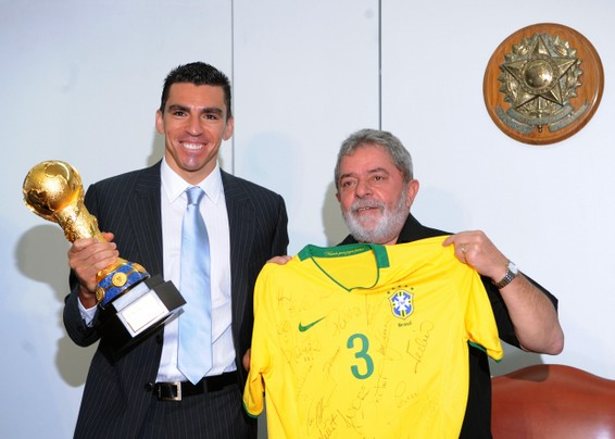 O presidente Lula recebe uma camisa autografada do capitão da seleção brasileira de futebol, e o zagueiro capitão Lucio mostrando a taça da Copa das Confederações de 2009.